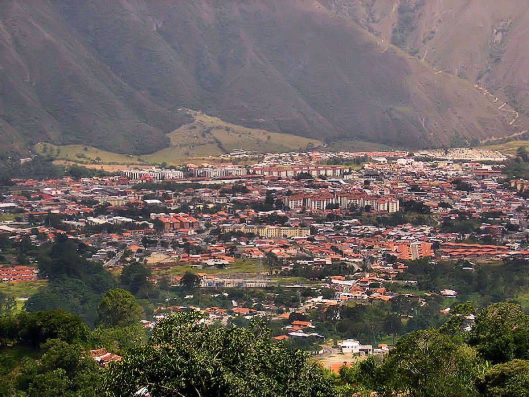 Opera a 4 Mani Creata dalla Collaborazione Congiunta degli Utenti Lodewijk Vadacchino e MeridaItalia. l'Immagine Raffigura il Panorama a Mezzogiorno della Città di Ejido in Venezuela. si rilascia l'immagine in cc-by-sa 3.0. Distintissimi Saluti--09:33, 2 mag 2010 (CEST)